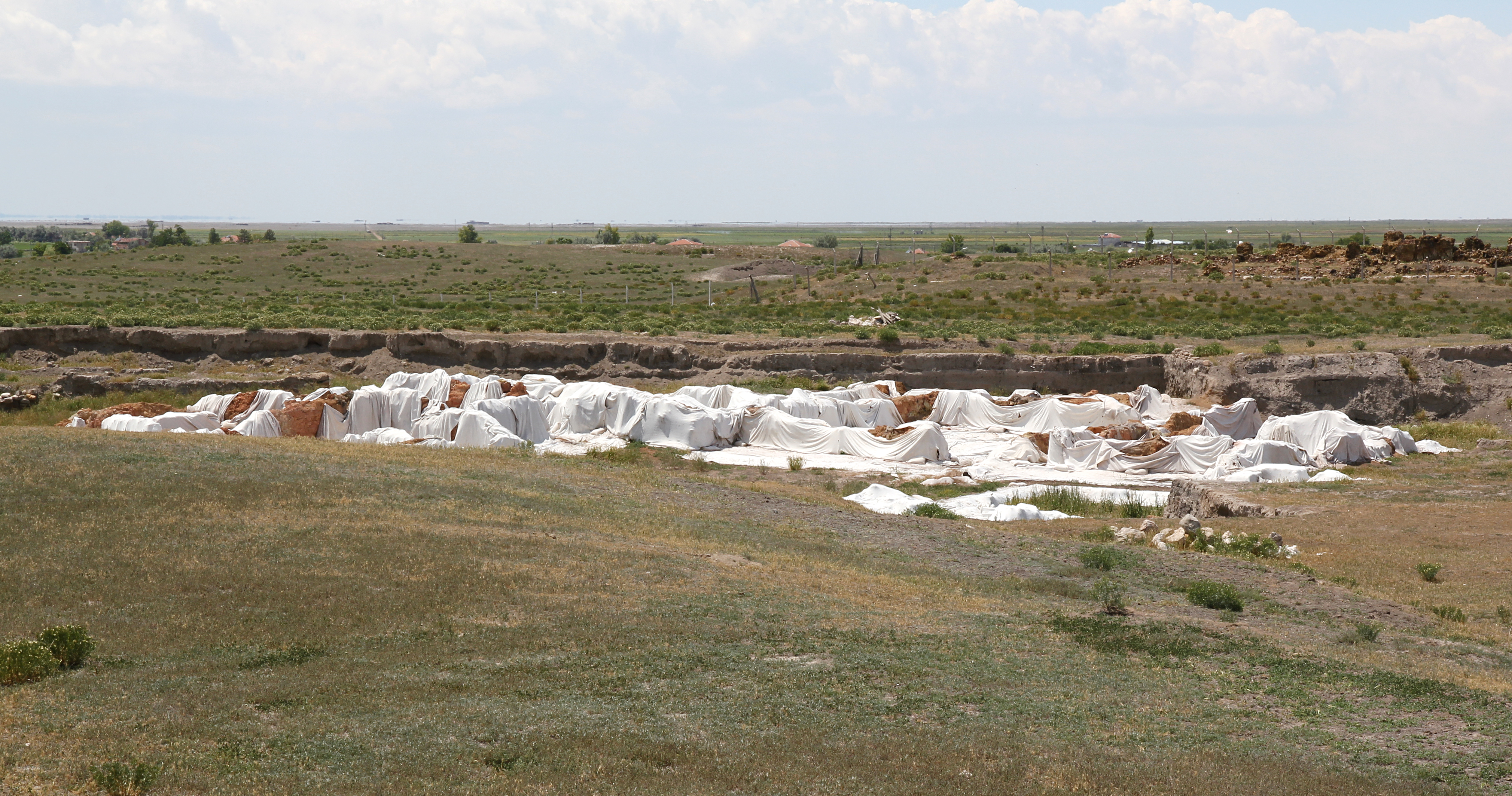 Acemhöyük, Siedlungshügel im Dorf Yeşilova bei Aksaray, Türkei